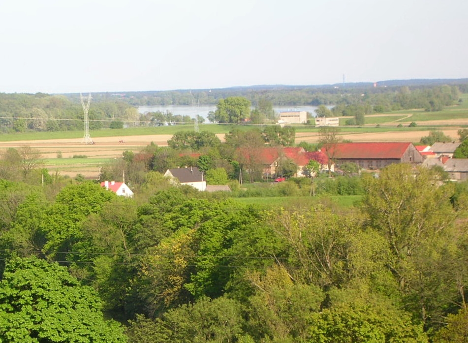 Widok w kierunku Łęgnowa i Wisły ze Wzgórza Bolesława Krzywoustego w Bydgoszczy